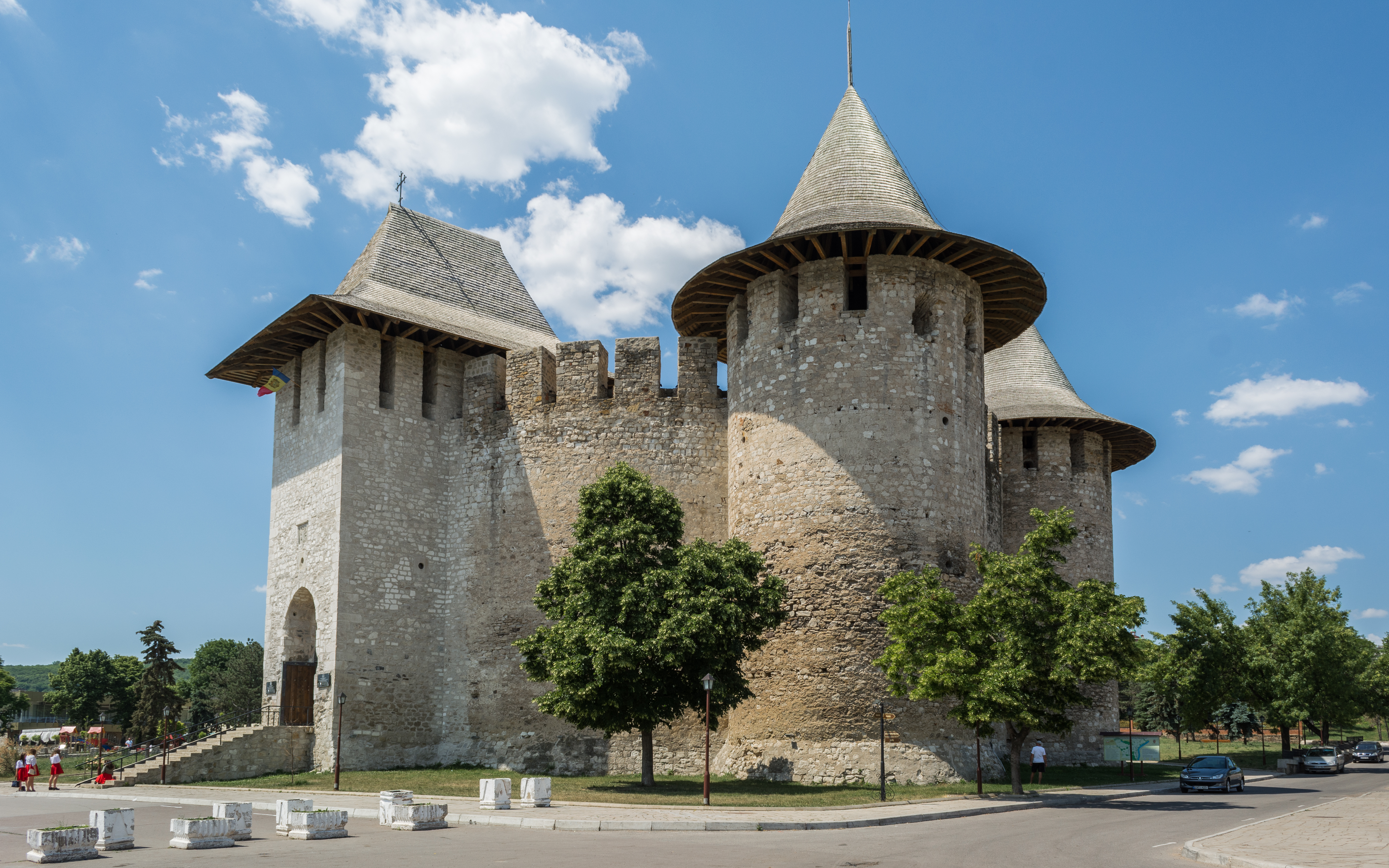 Сорокская крепость / Cetatea Soroca / Soroca Fortress